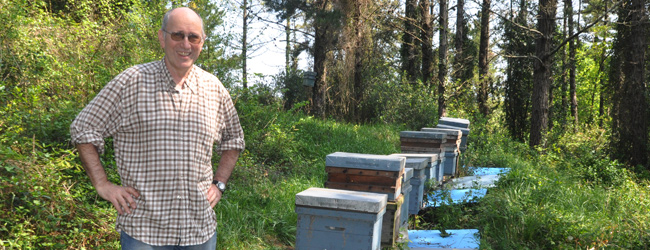 Martxel Aizpurua biologo eta erlezaina 2020an